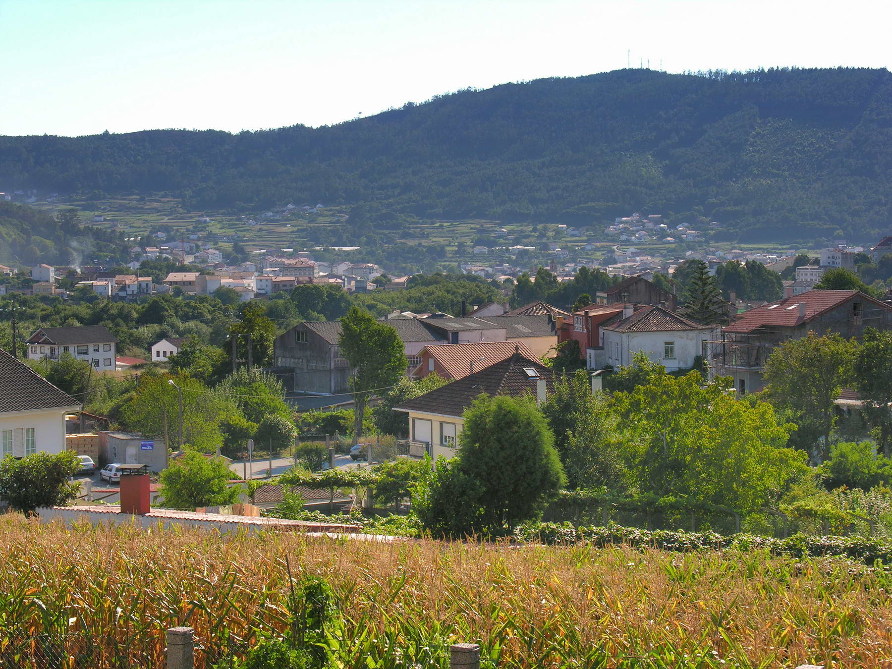 Noia e igrexa, Galicia Publish by= Luis Miguel Bugallo Sánchez.